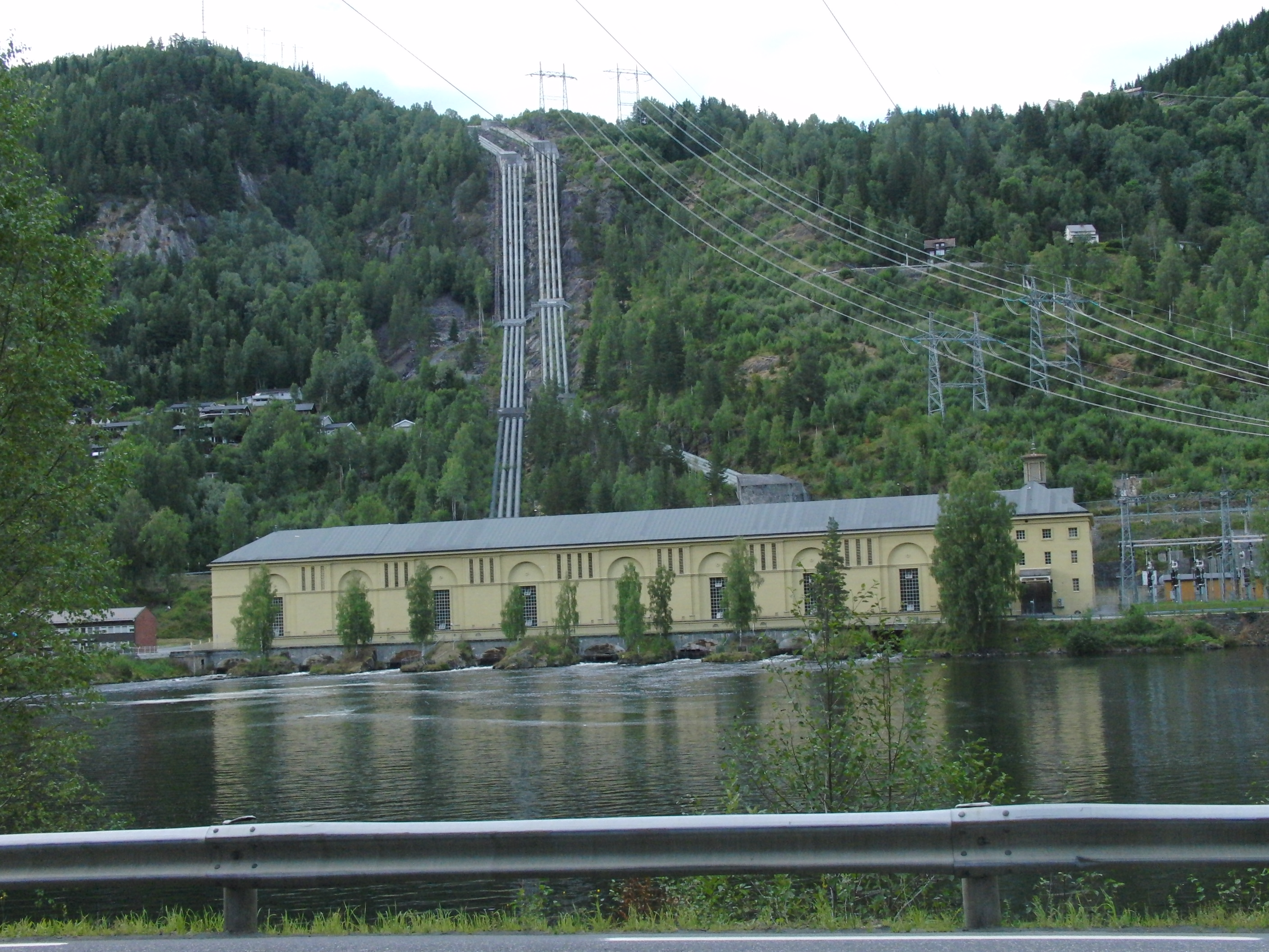 Nore I kraftverk